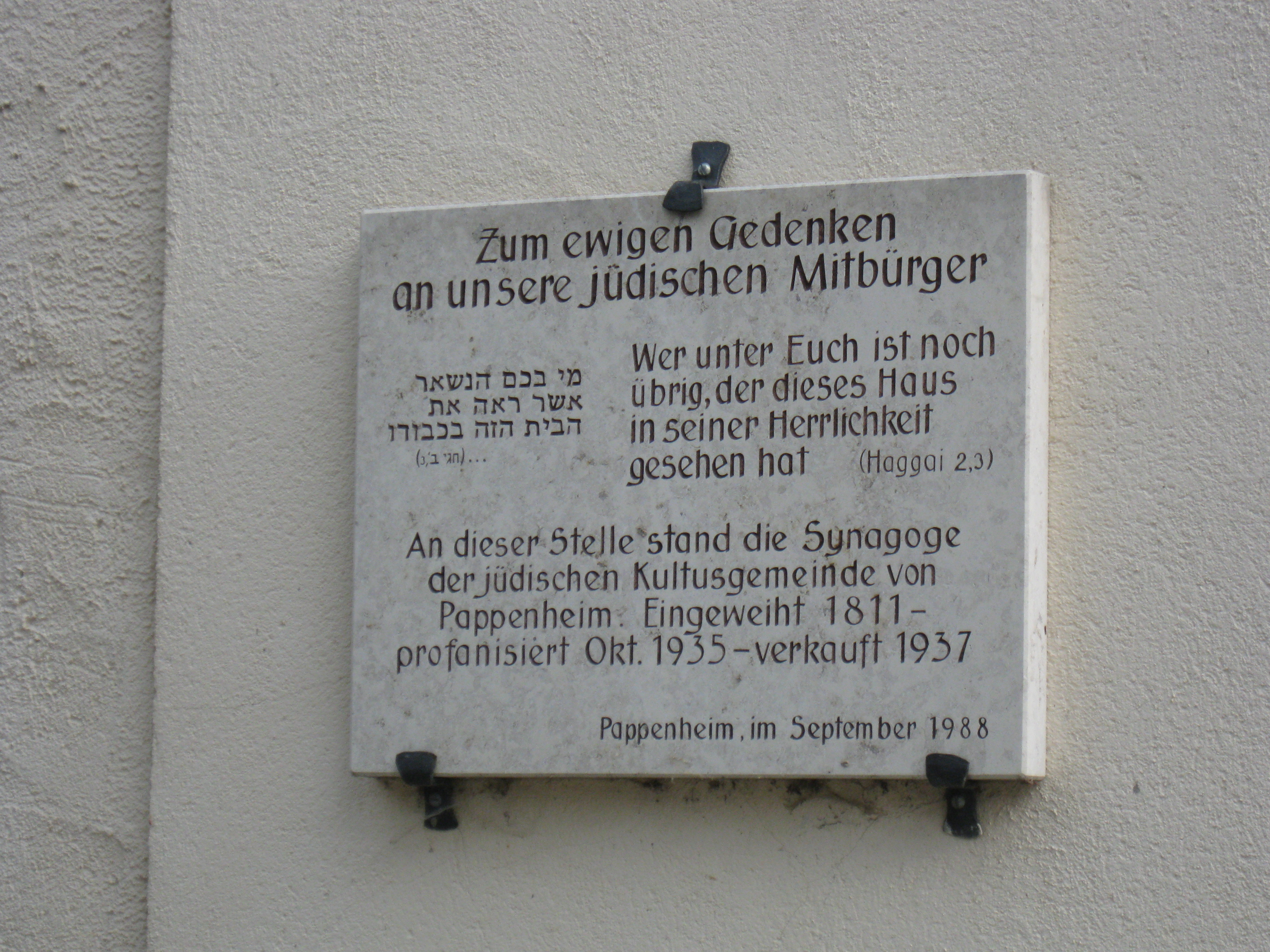 Pappenheim